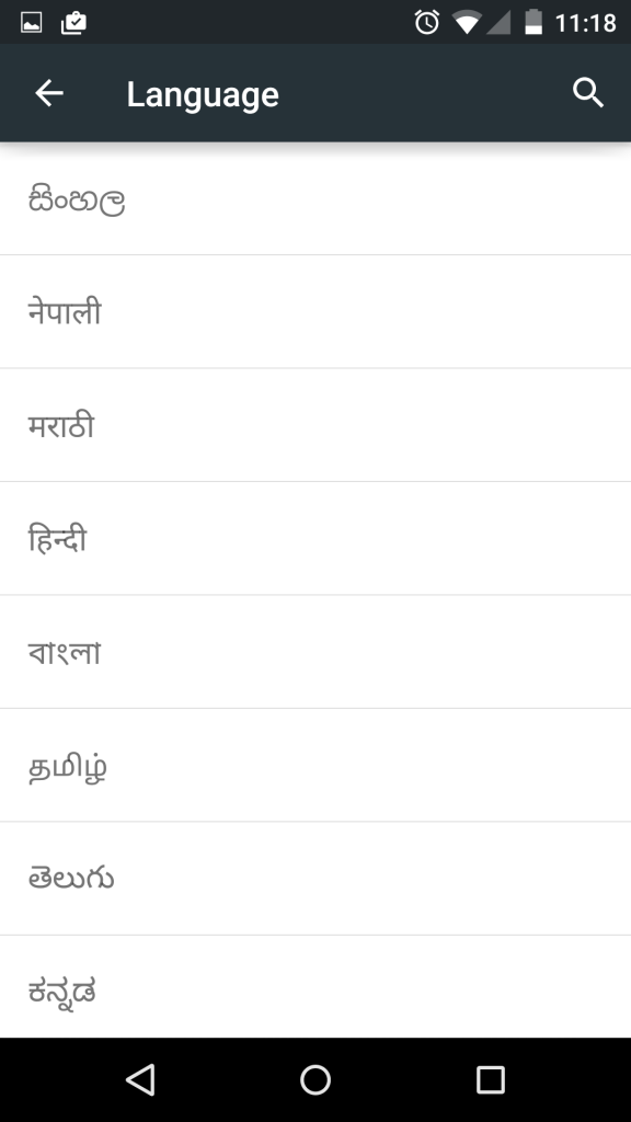 සිංහල: ඇන්ඩ්‍රොයිඩ් 5 අනුවාදය ධාවනය වන සැම්සුං නෙක්සස් 5 ස්මාට්ෆෝනයේ භාෂා සැකසුම් තුළ සිංහල භාෂාව පෙන්වමින්